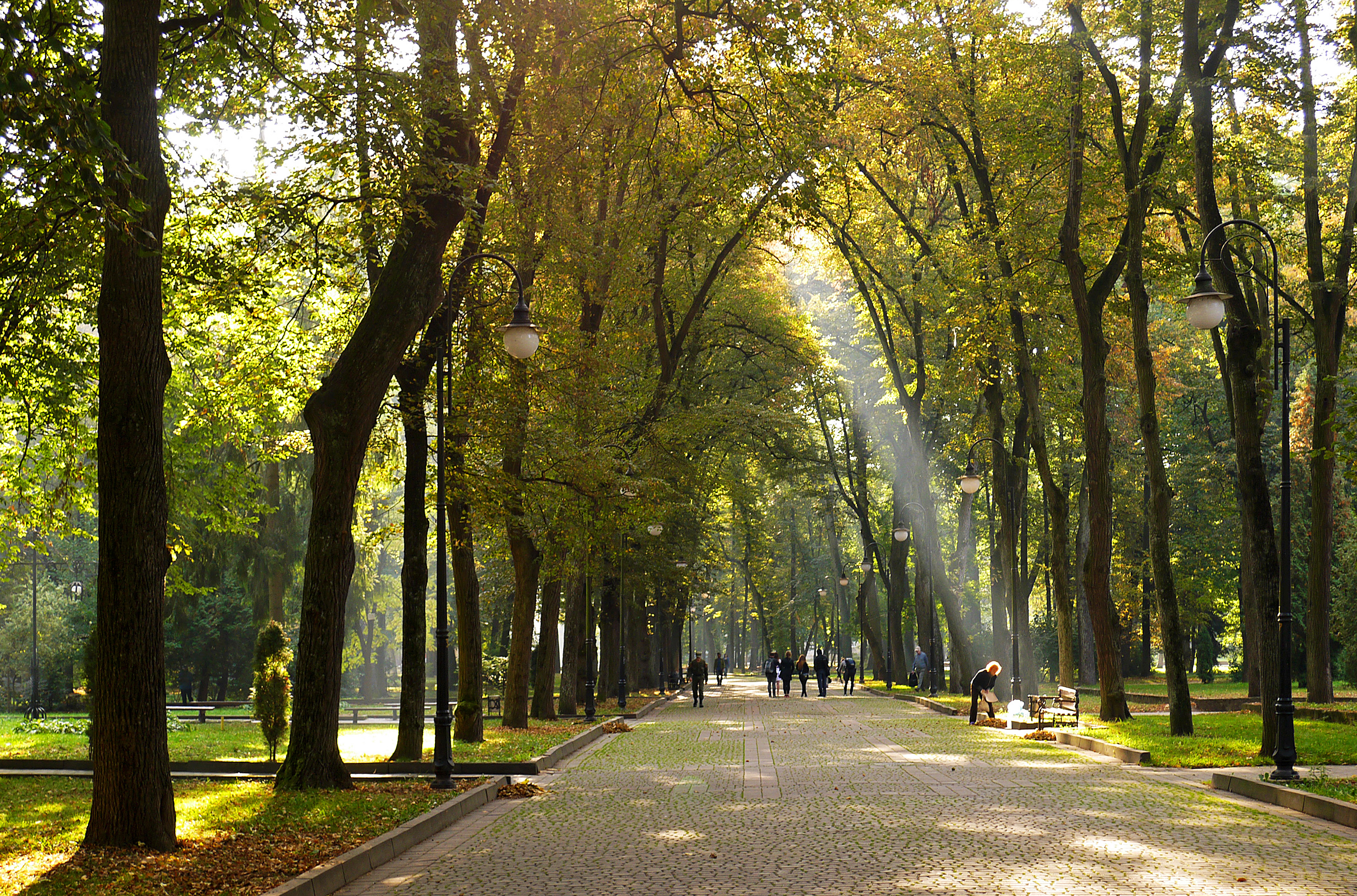 «Парк ім. Т. Г. Шевченка», м. Івано-Франківськ